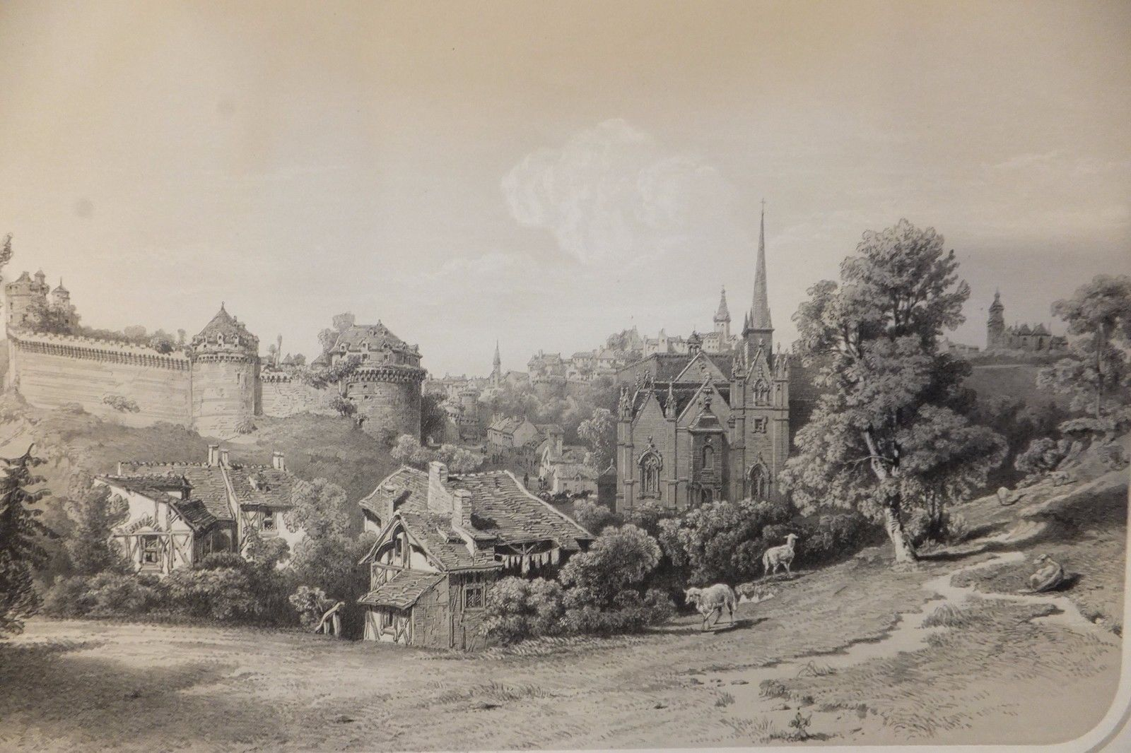 Vue de Fougères